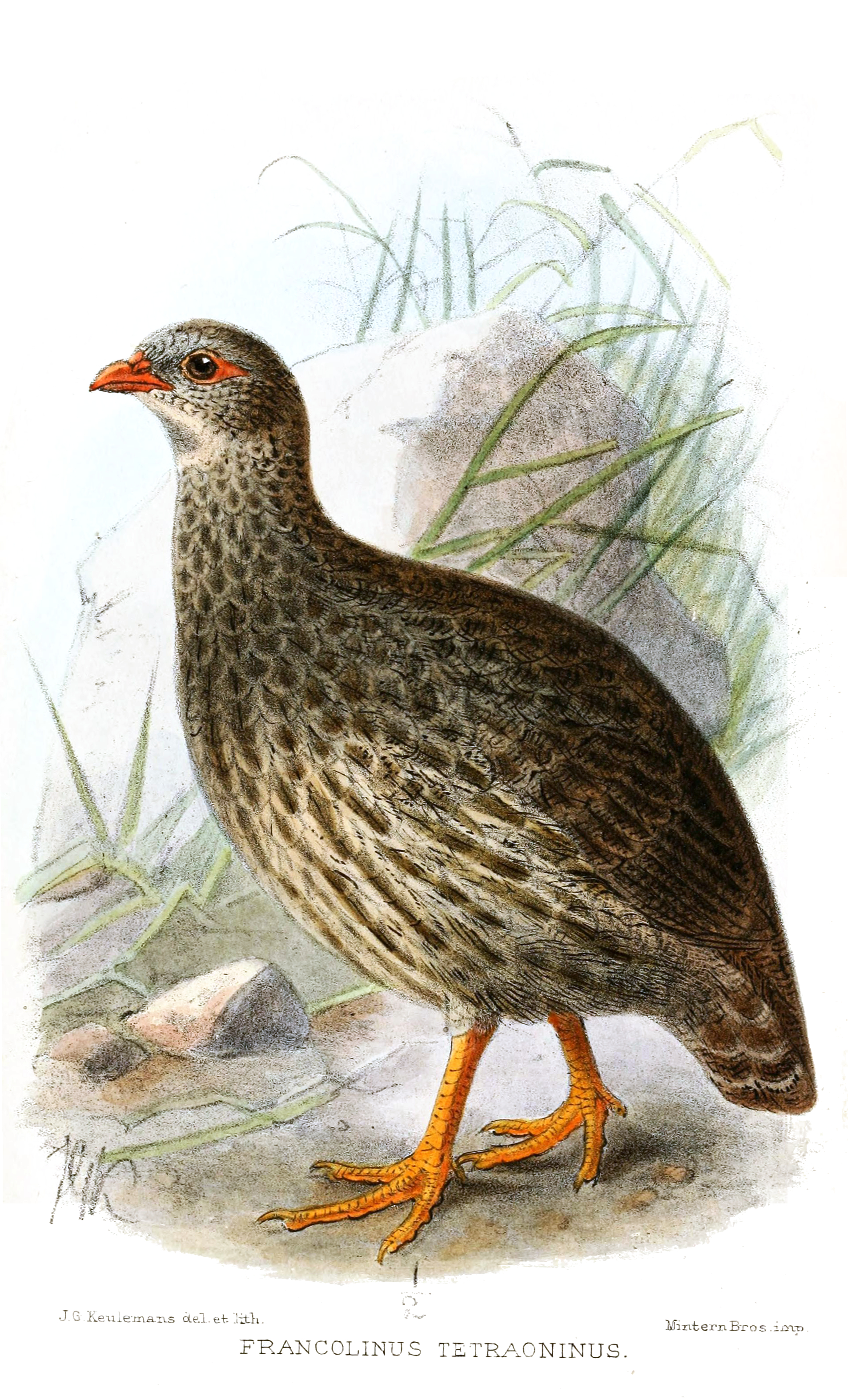 Francolinus squamatus tetraoninus